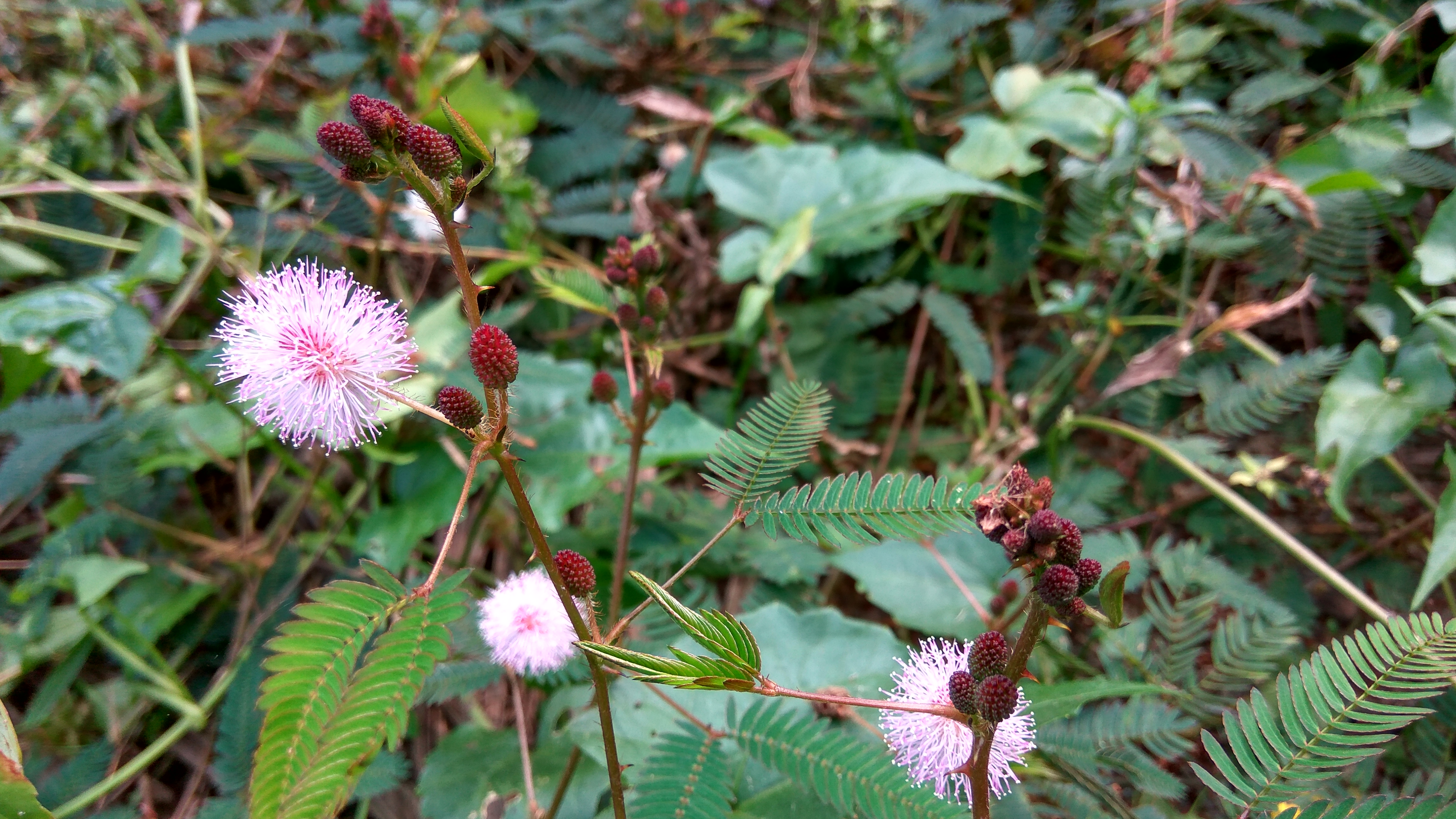 বাংলাদেশের ফুল